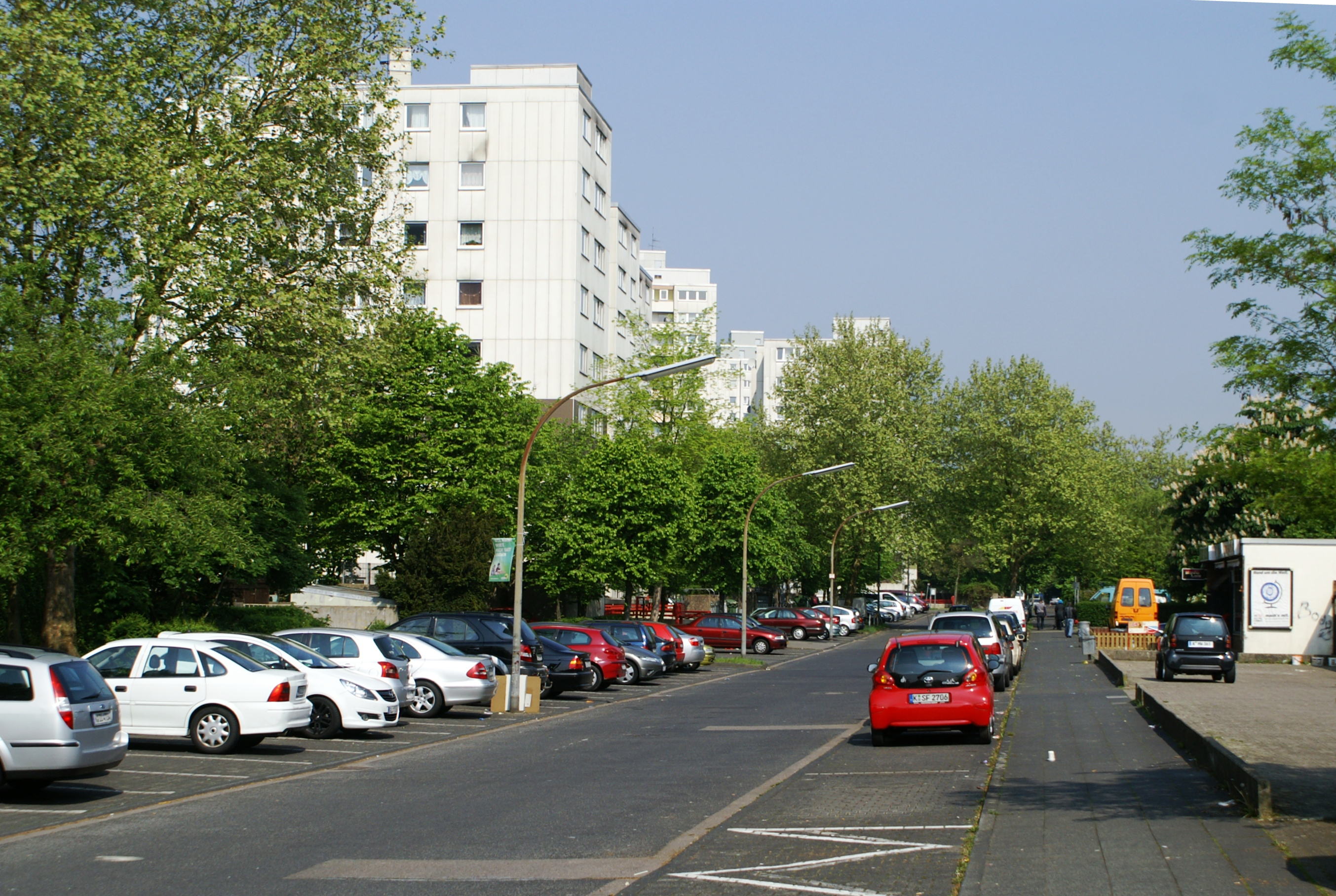 Straßenseitige Ansicht der Häuser an der Gernsheimer Straße